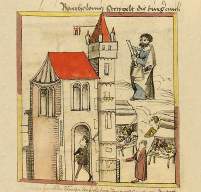 Der Bartholomäusmarkt, [folio438v]